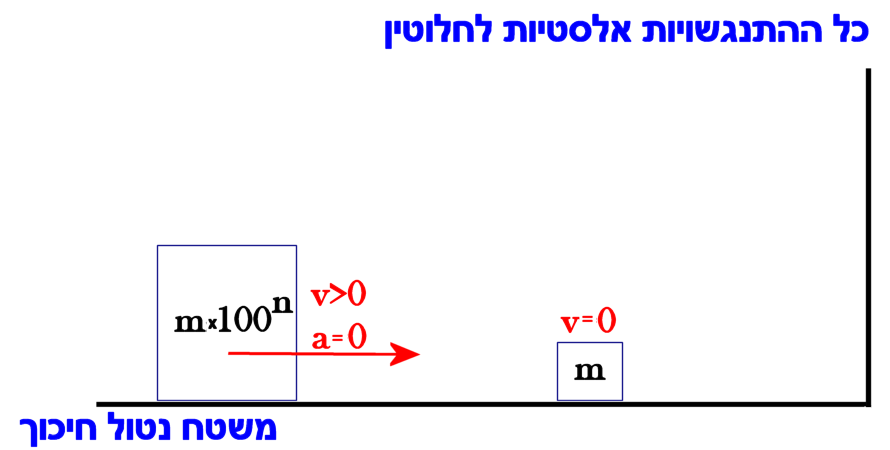 תוצאות ניסוי זה מניבות את ספרות פיי, בדיוק עולה ככל שהחזקה השלמה n גבוהה יותר